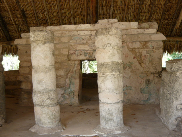 Estructura Las Manitas, San Gervasio, Cozumel, Quintana Roo, México.